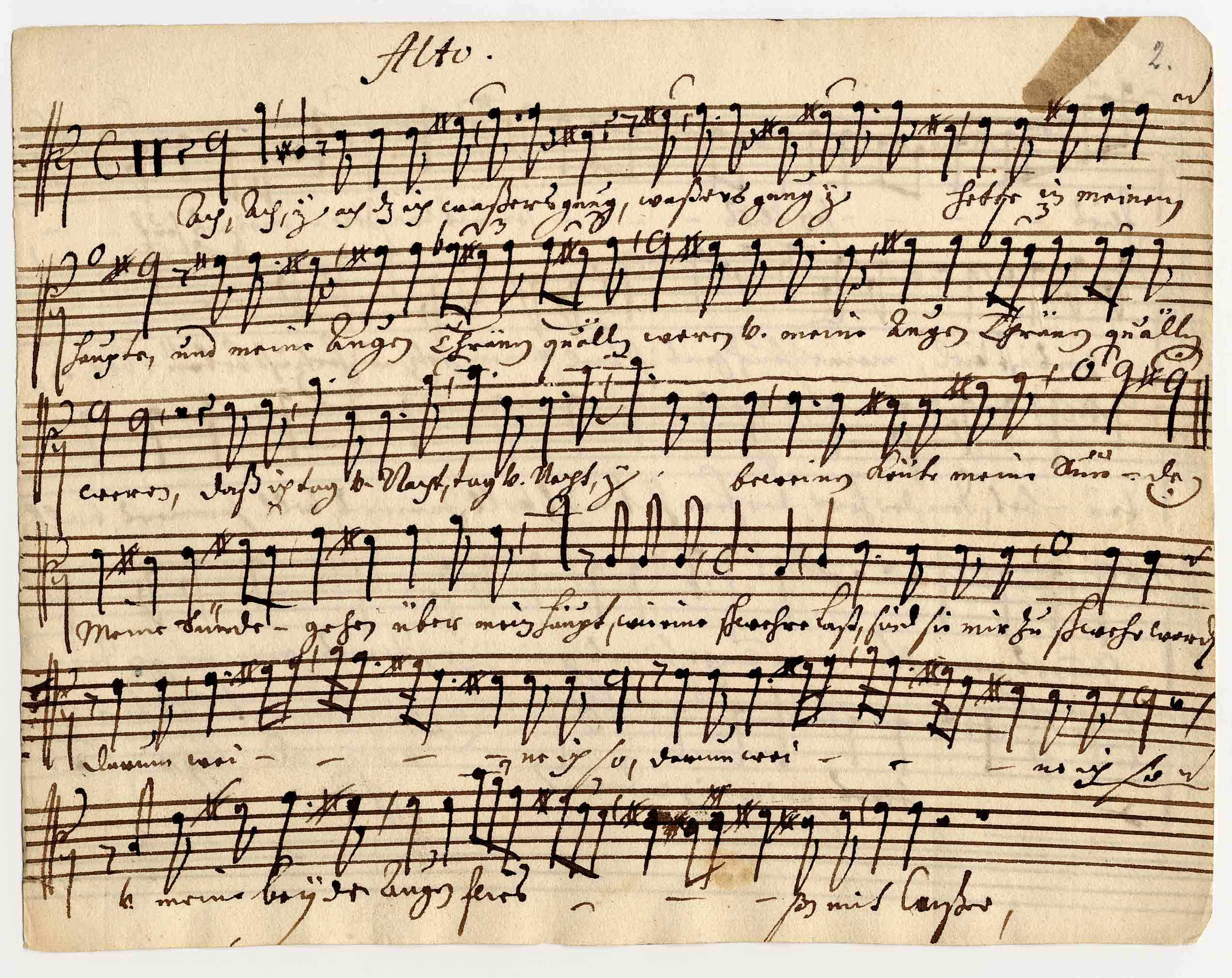 Manuskript zu "Ach dass ich Wassers genug hätte"